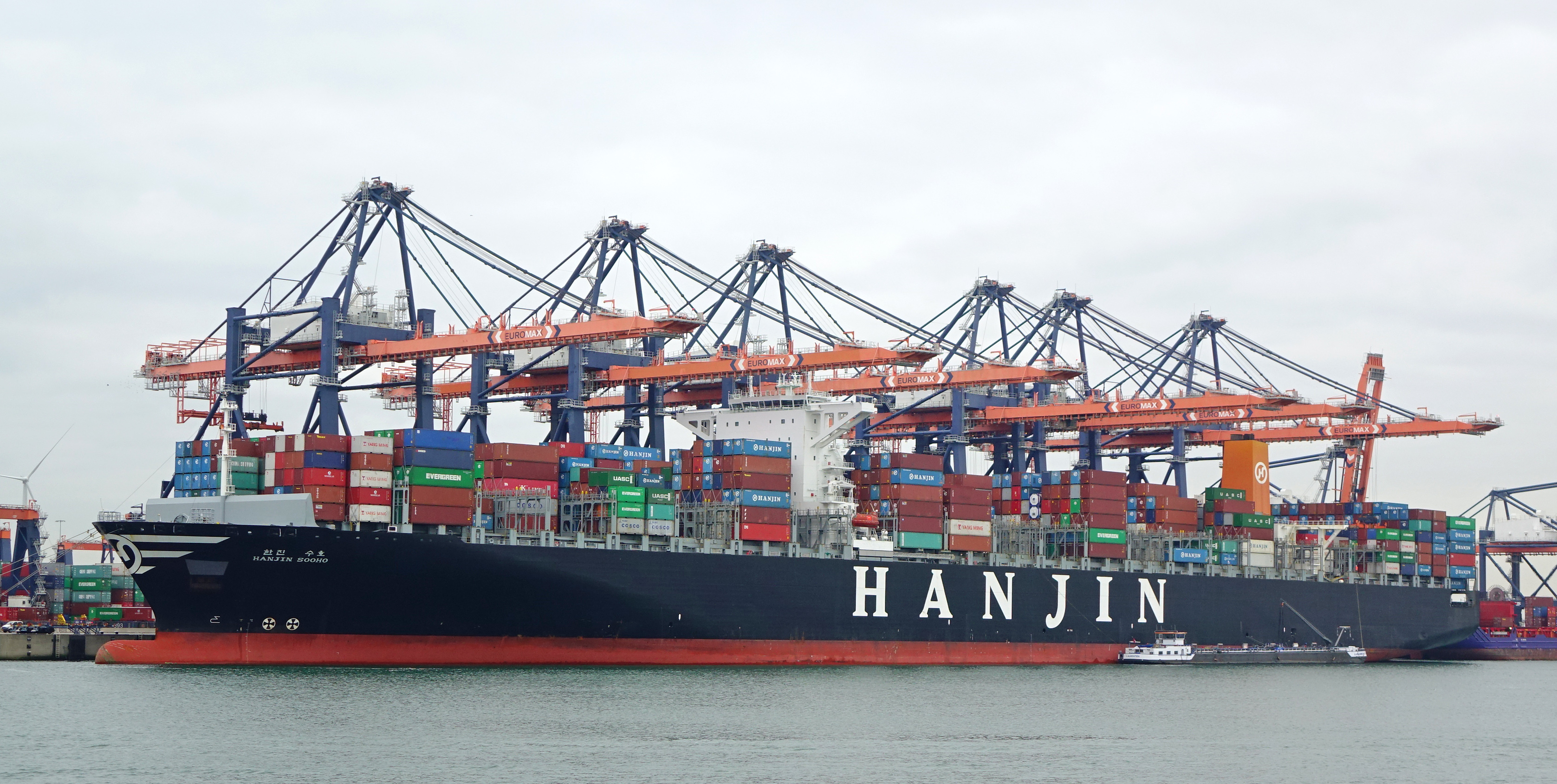 Containerschiff Hanjin Sohoo am Euromax-Terminal im Yangtzehaven, Rotterdam